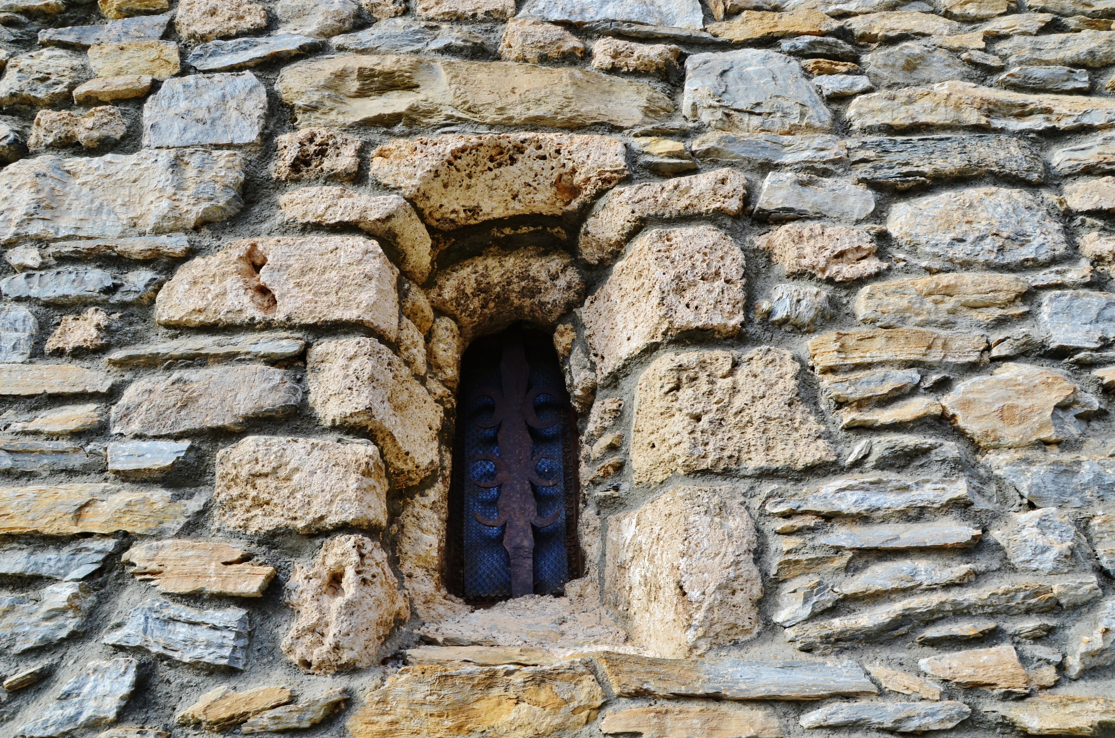 Església de Sant Climent de Pal